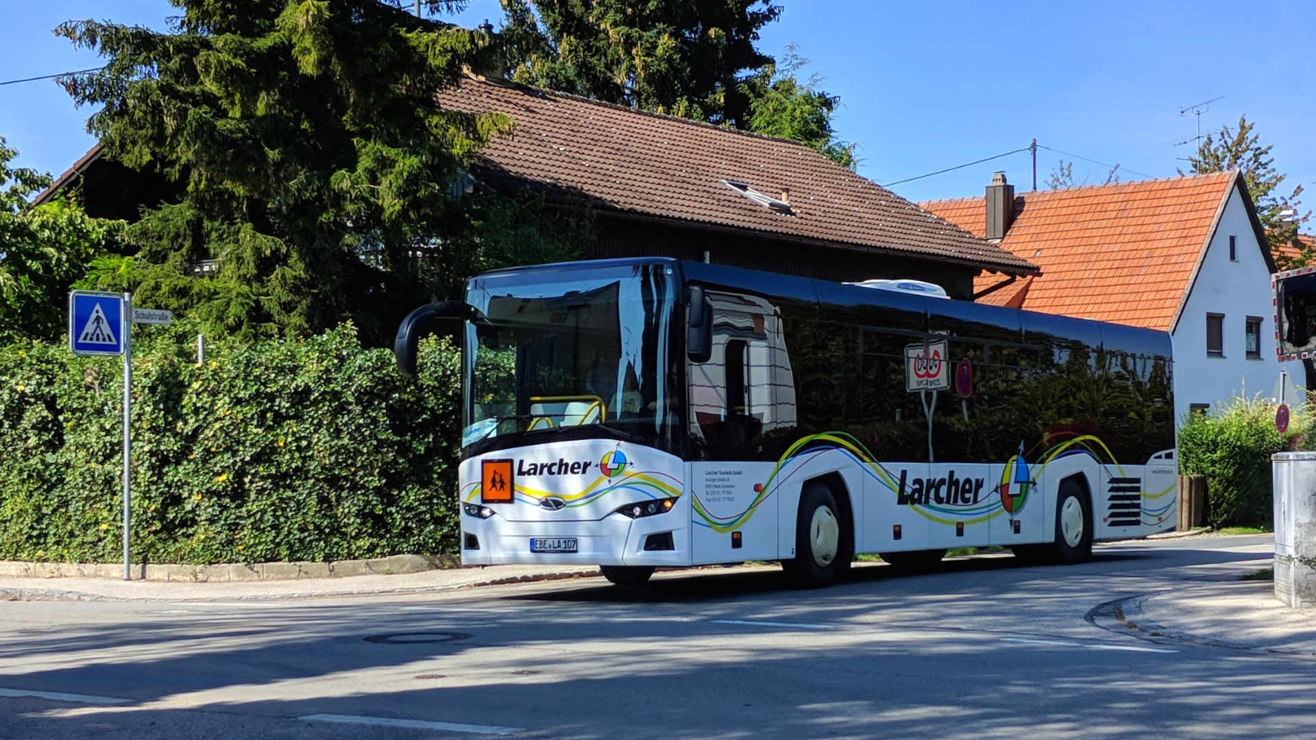 Ein Überland-Schulbus der Firma Larcher Touristik aus Markt Schwaben, Typ Solaris InterUrbino 12, an der Forsterner Grundschule.